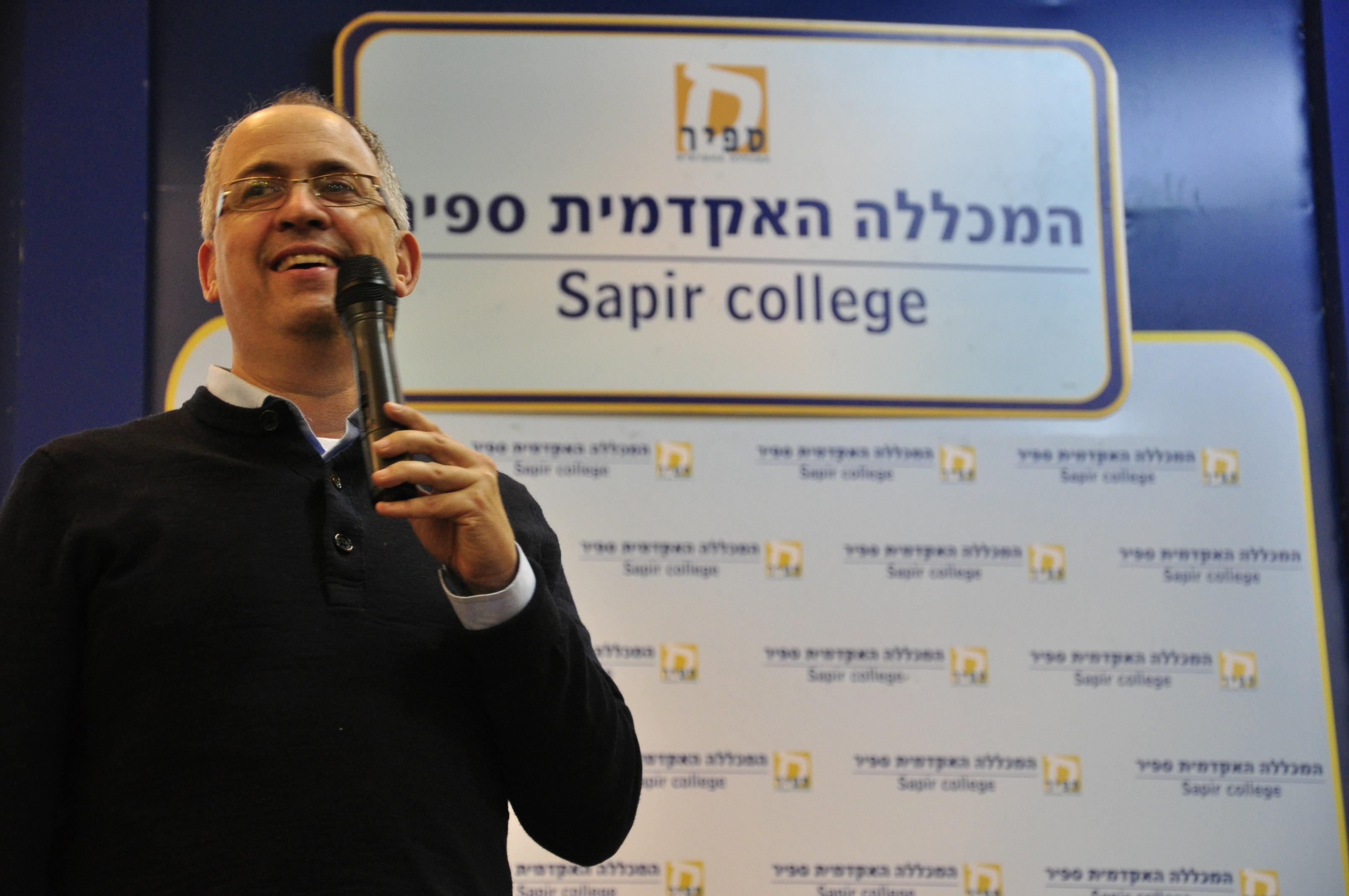 גיא רולניק בכנס שדרות לחברה במכללה האקדמית ספיר ובעיר שדרות 2015